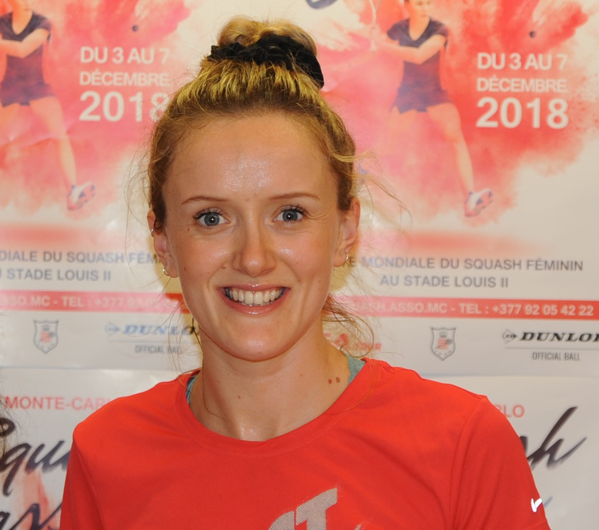 Rachael Chadwick, Monte-Carlo Squash Classic 2018